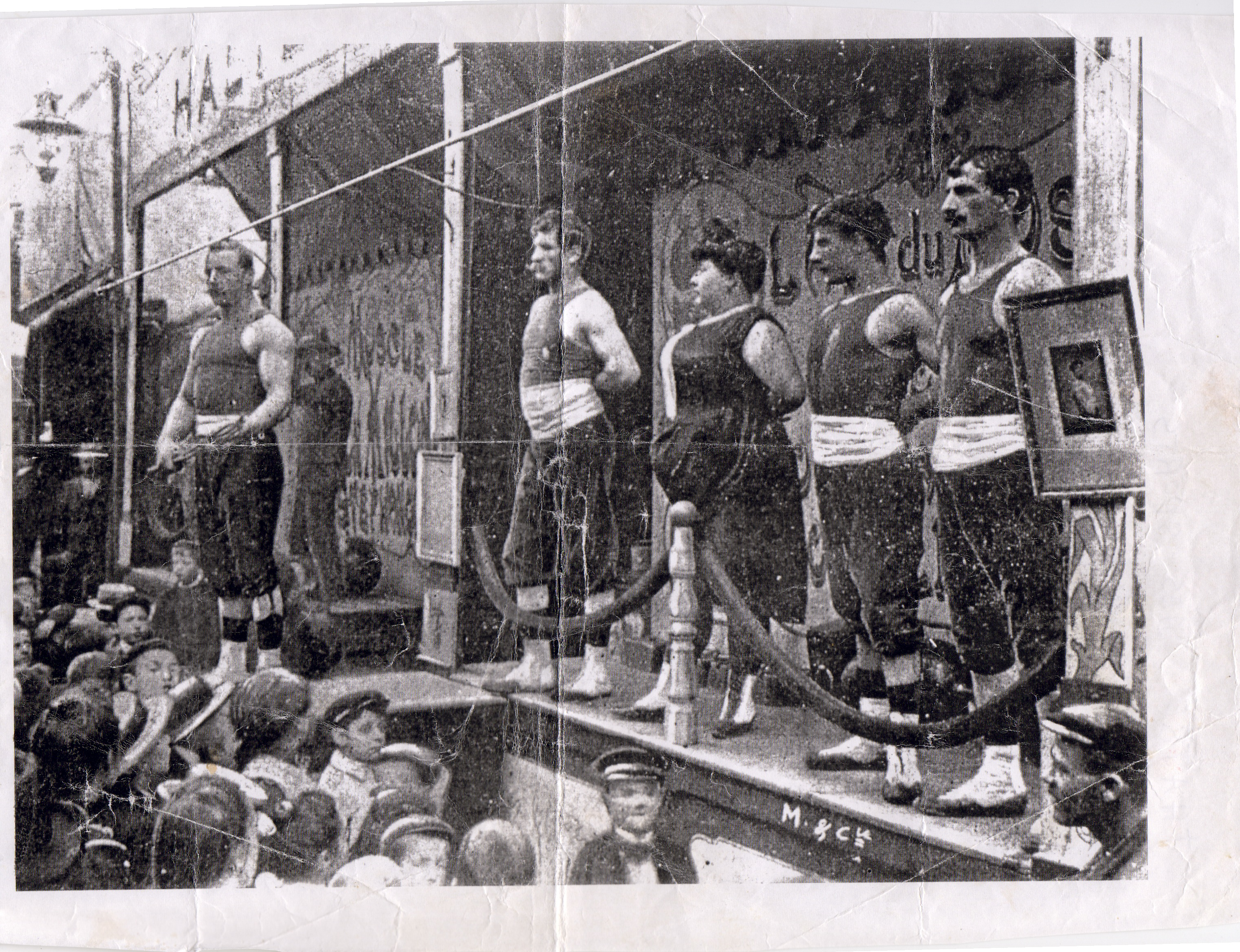 baraque de lutte de la famille méjean 1910-1920